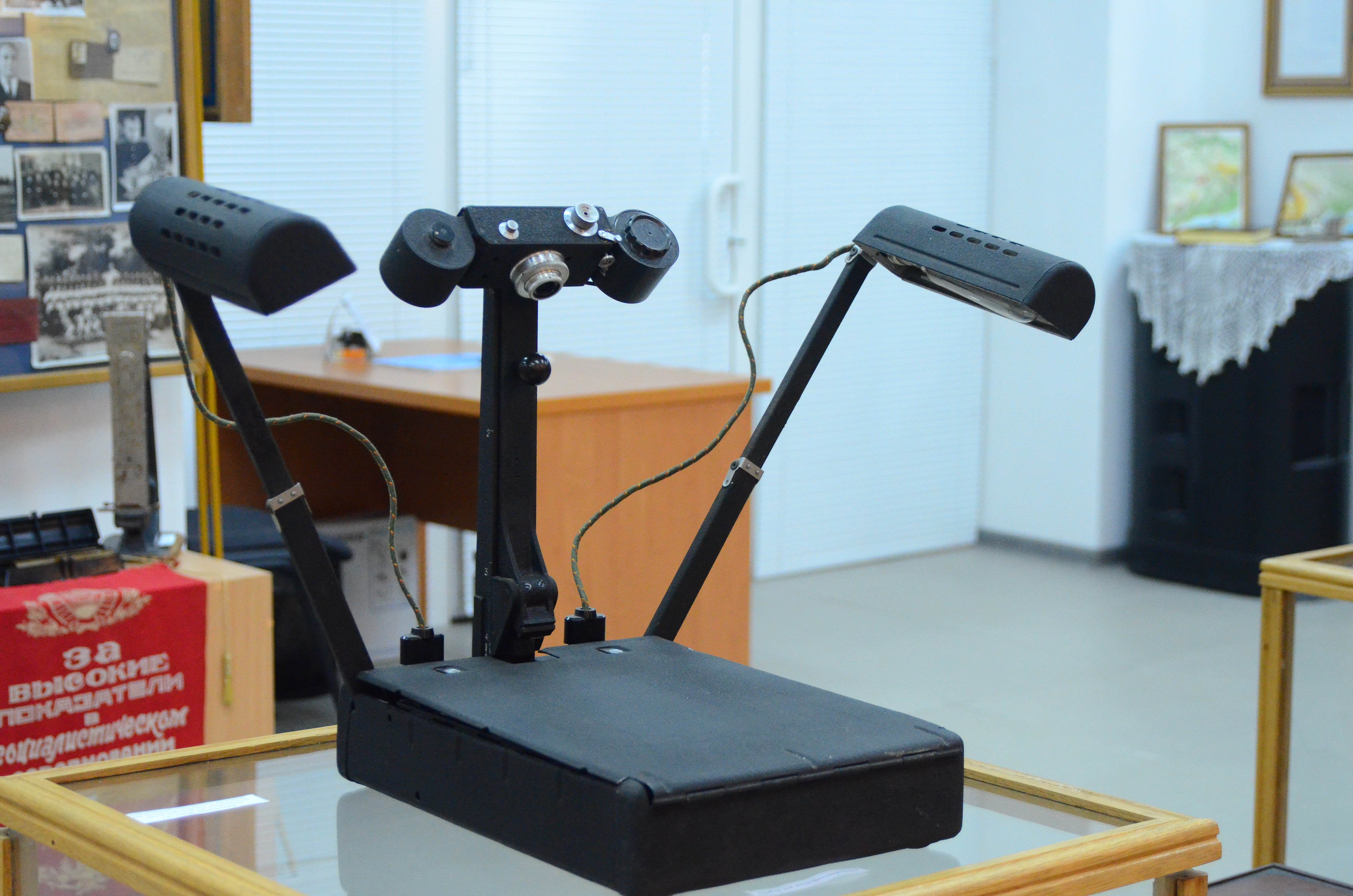 Музей историии и развития Донецкой железной дороги